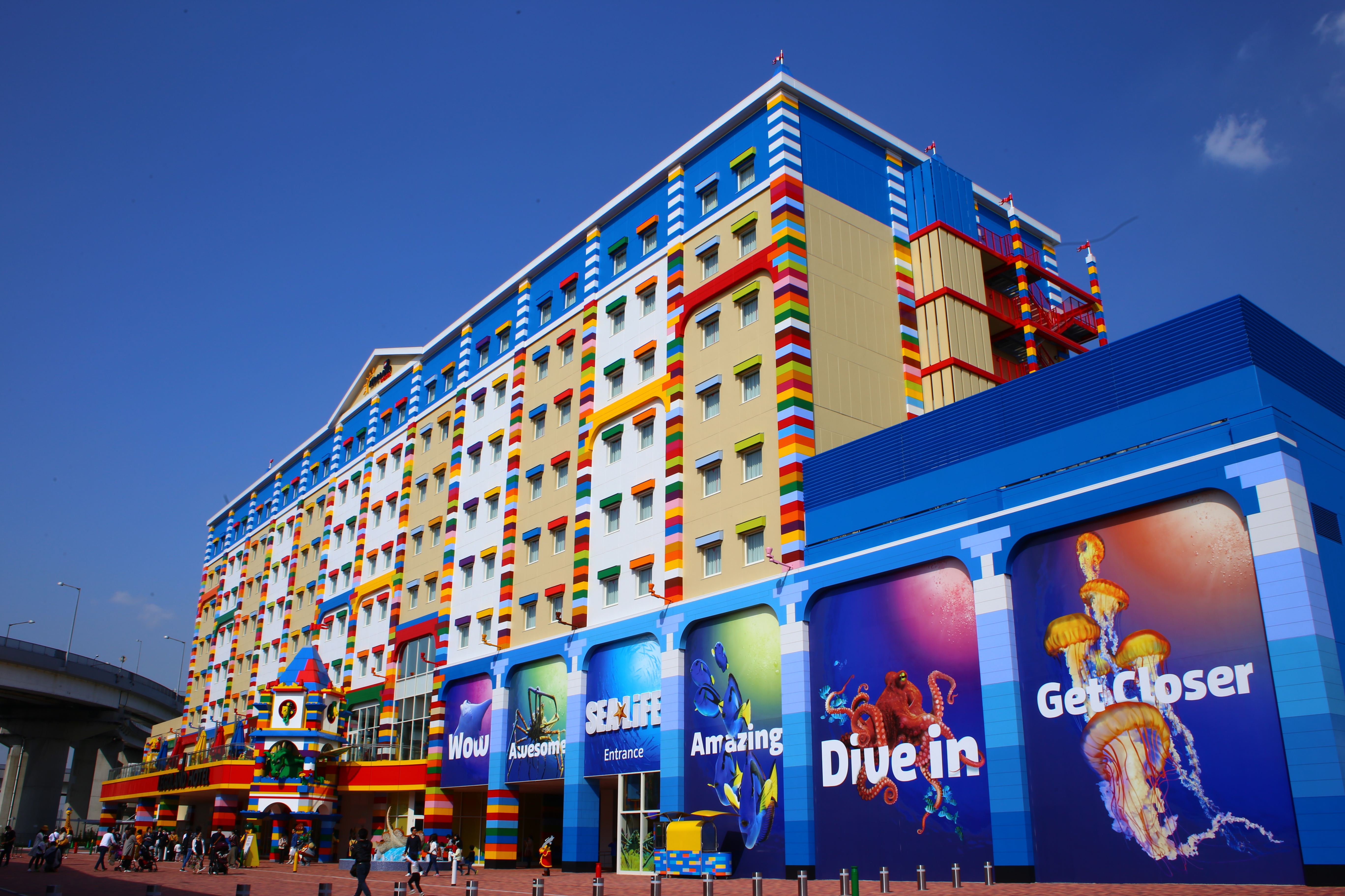 名古屋市港区金城ふ頭のレゴランドジャパンホテル